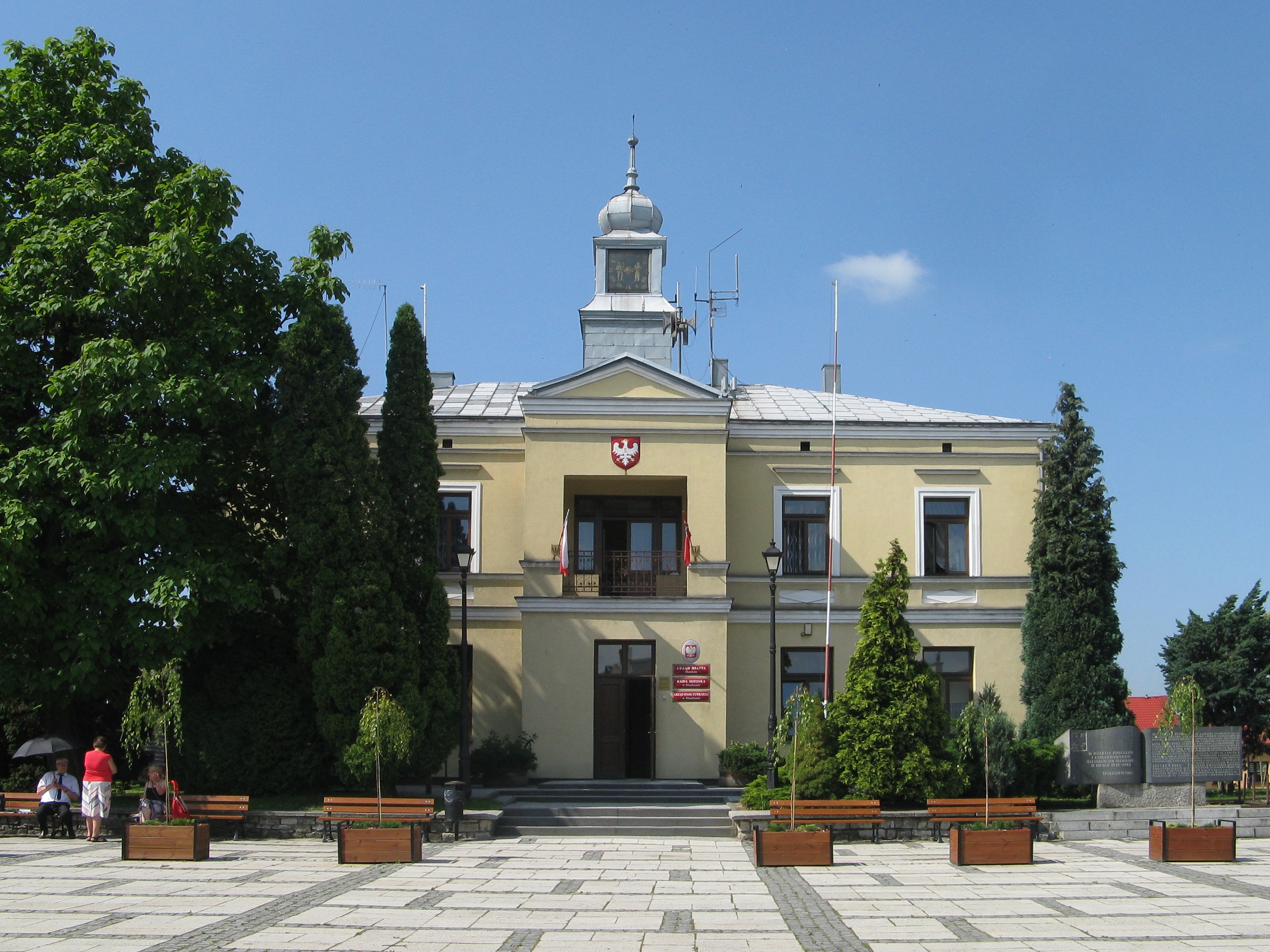 Ratusz w Sławkowie na rynku.